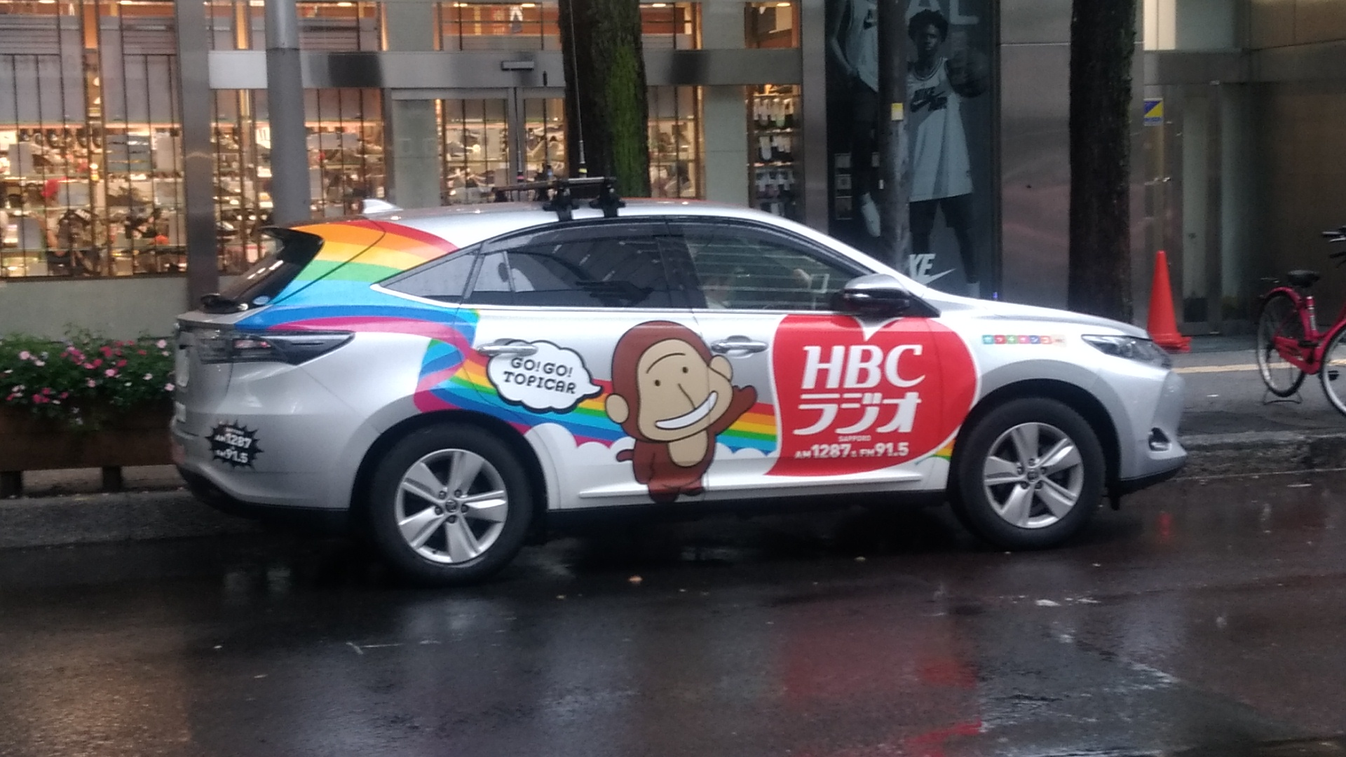 HBCラジオのトピッカー。(2015年～)